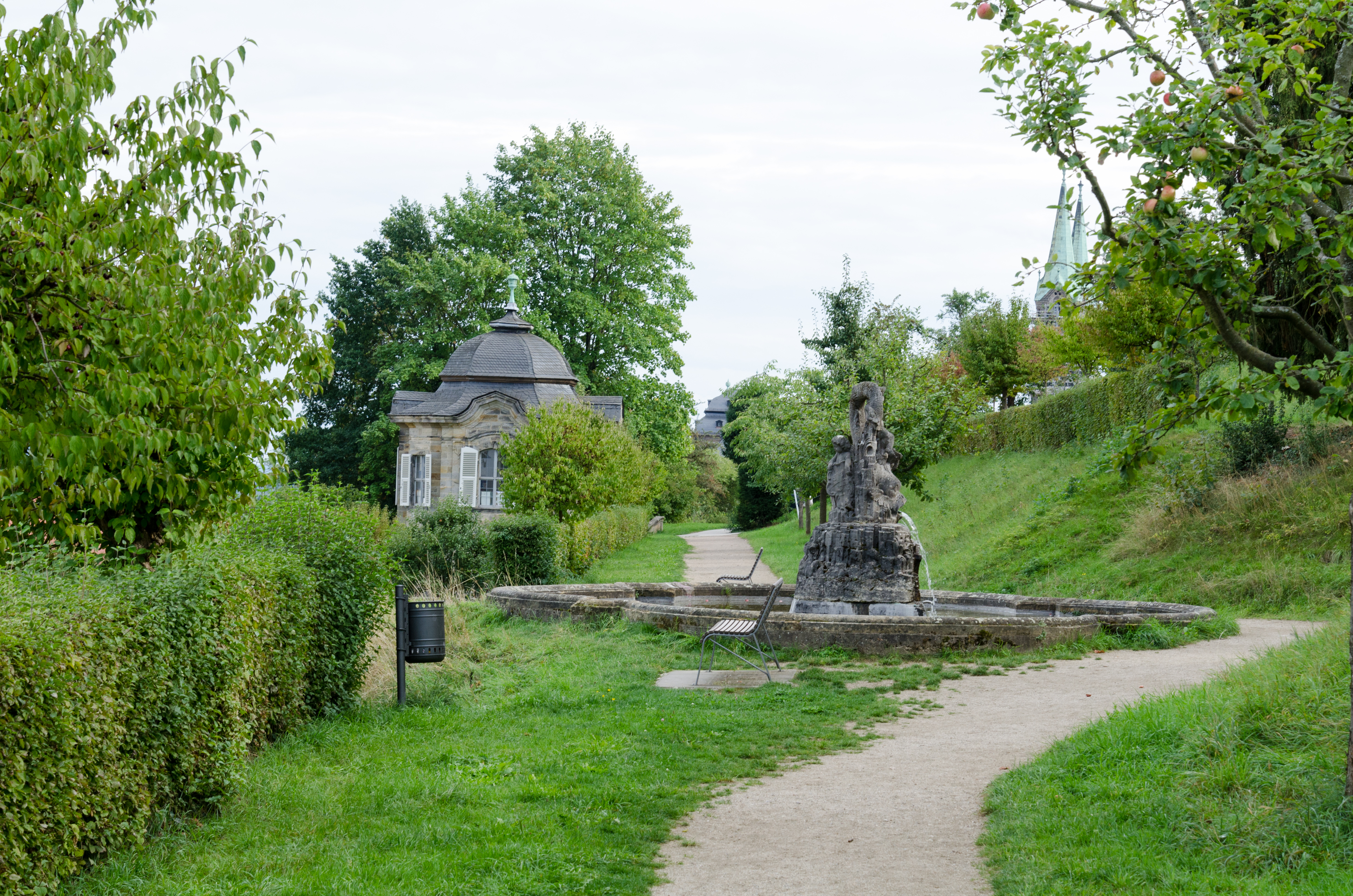 Bamberg, Michaelsberg 10d, Benediktinerweg, Nord-Süd-Blick